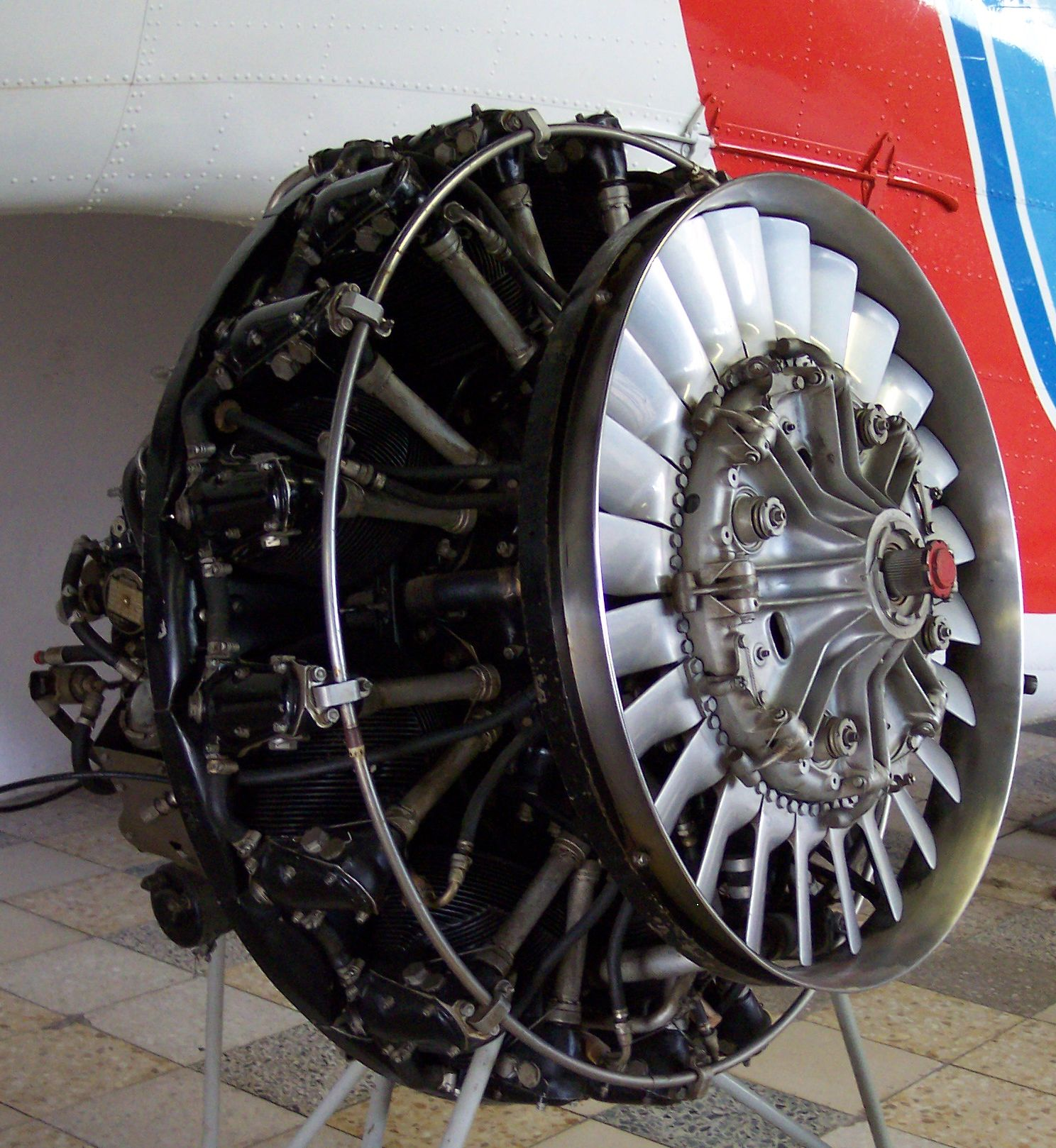 Alvis Leonides Mk 173-02 aus einer Sycamore Aufgenommen in der Flugzeugsammlung Hermeskeil